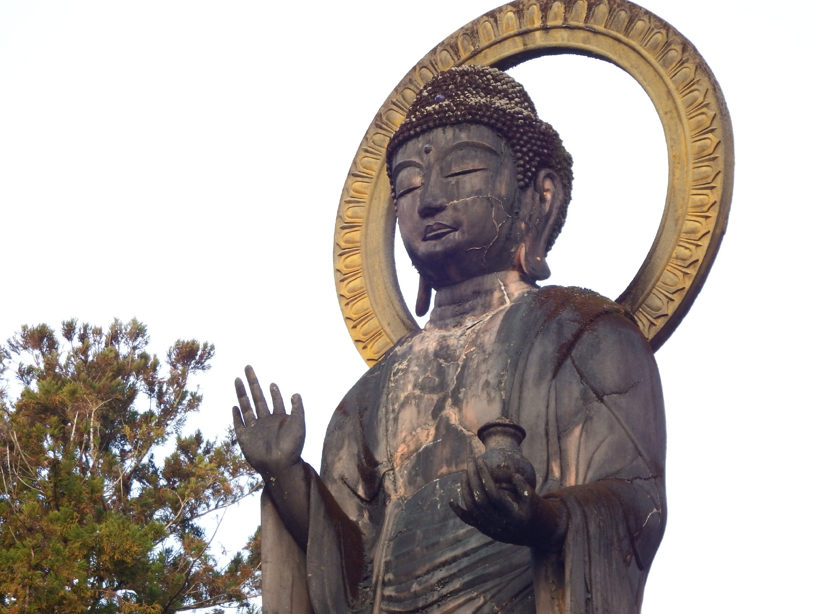 清滝寺の厄除け薬師如来像